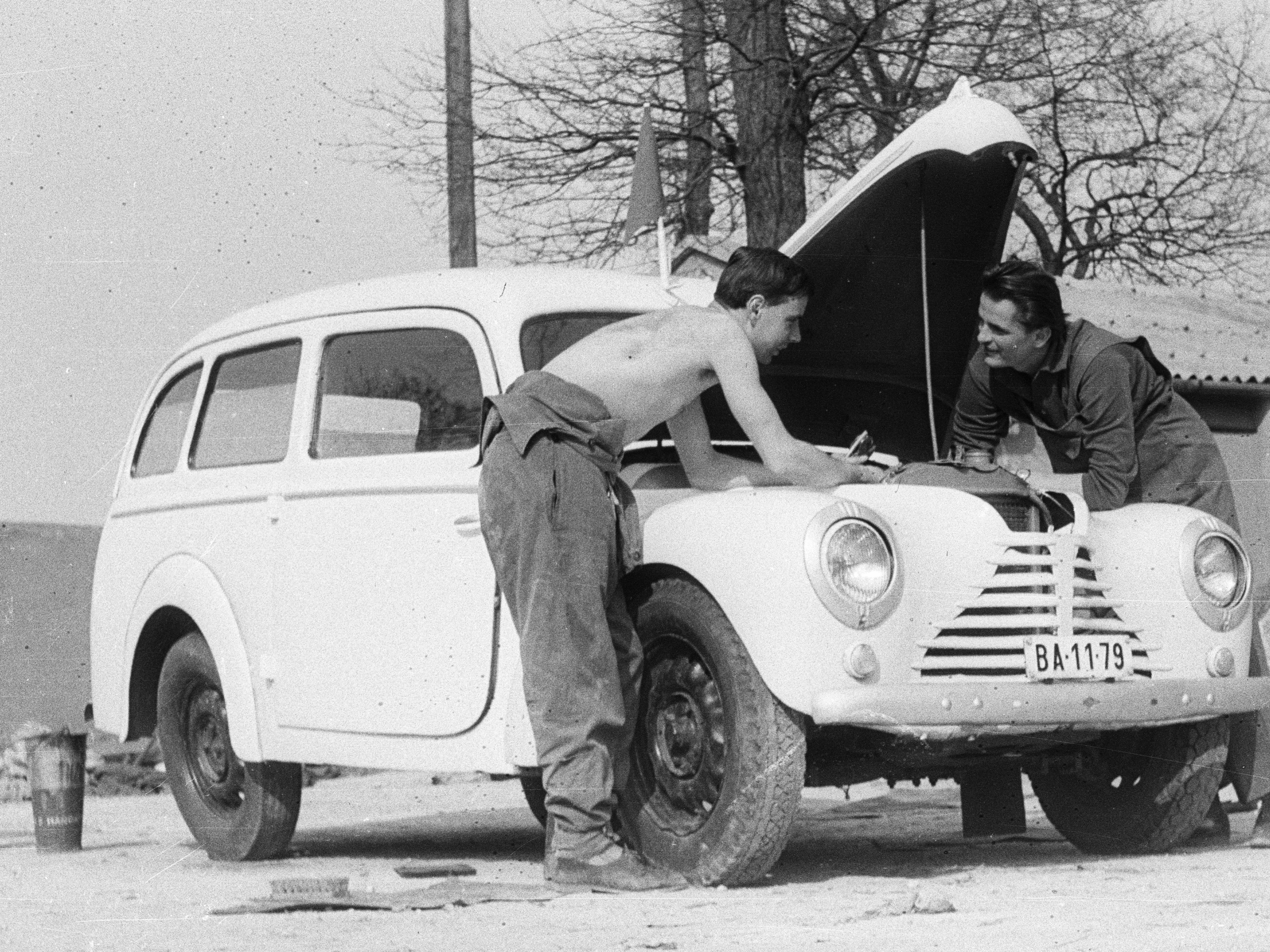 mentőautóként használt Skoda 1102 karbantartása. Location: Hungary, Budapest II., Hármashatárhegy Airport Tags: automobile, mechanic, Skoda-brand, Budapest Title: mentőautóként használt Skoda 1102 karbantartása.